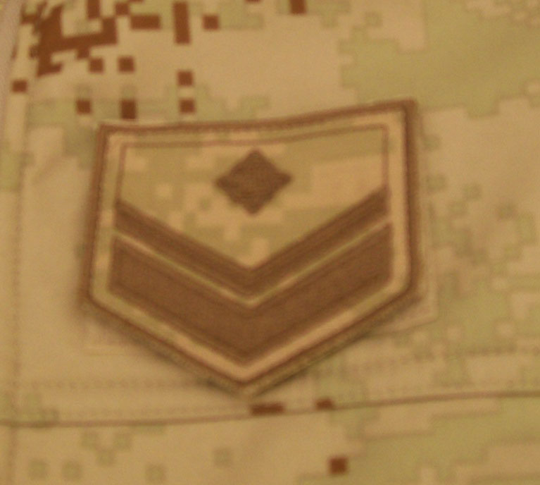 Čin narednika na pustinjsko-maskirnoj odori Hrvatske vojske